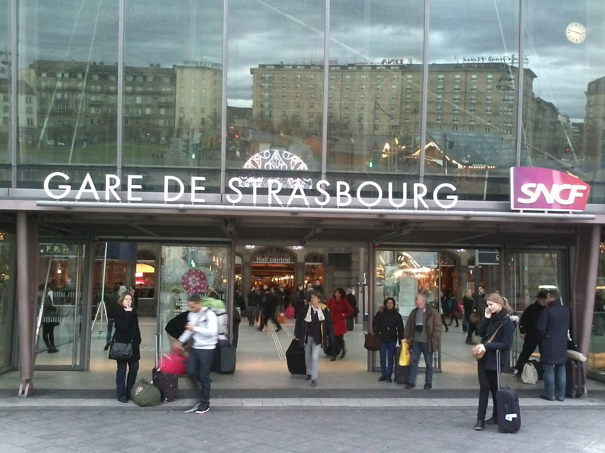 斯特拉斯堡站(gare de Strasbourg)